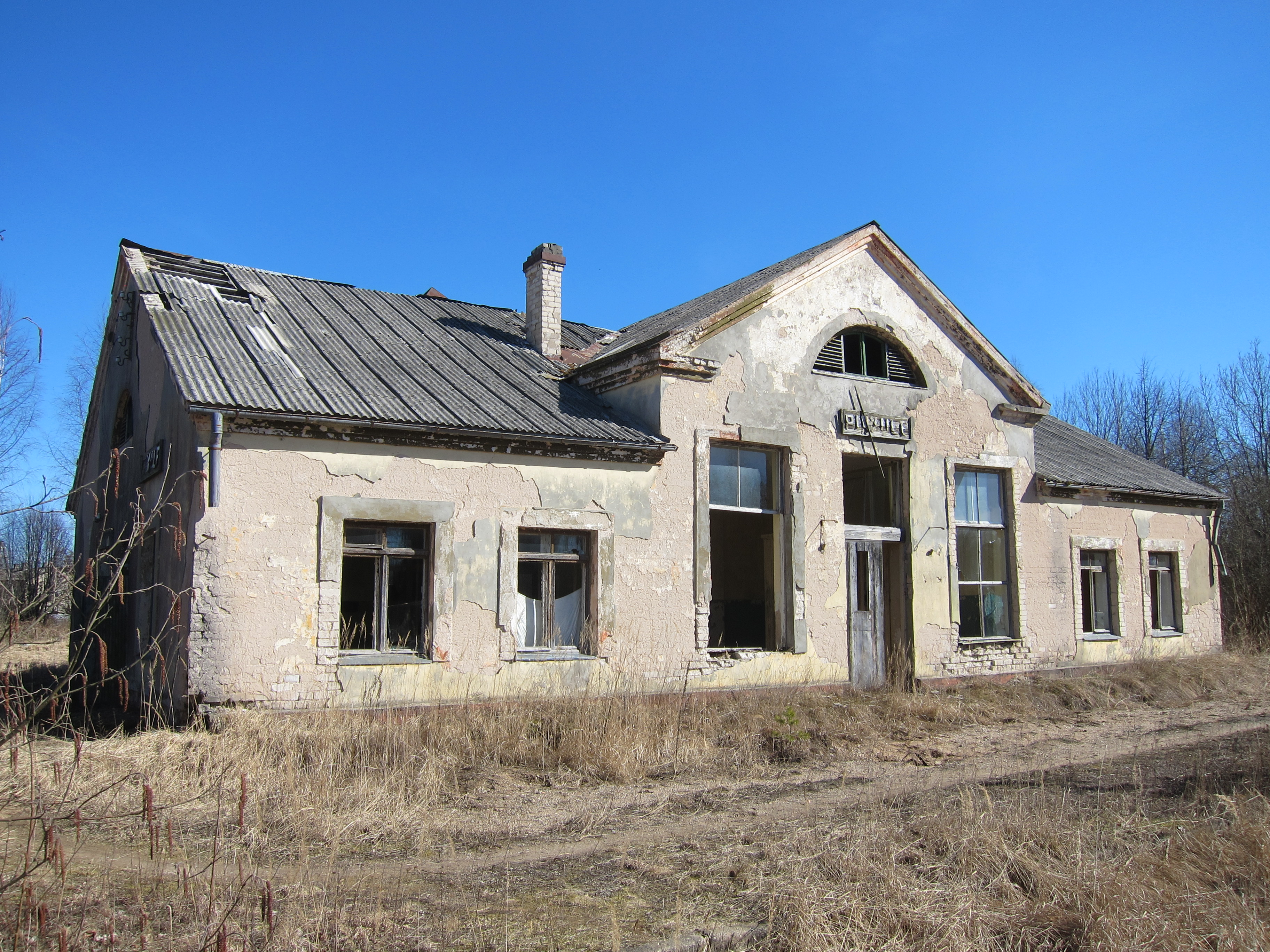 Puikules stacijas ēka